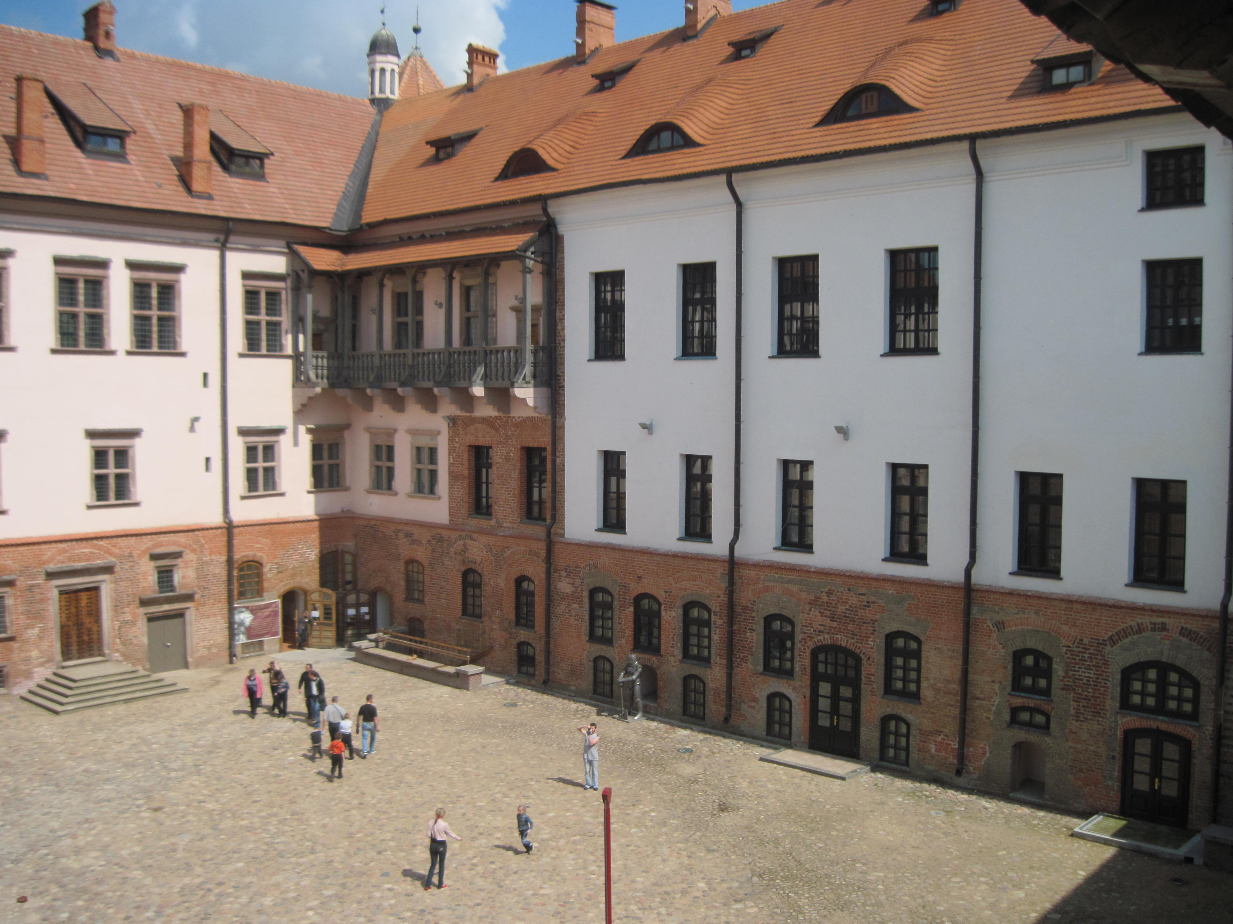 Мірскі замак. Выгляд на палацавы комплекс